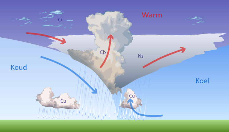 Dwarsdoorsnede van de atmosfeer met een occlusiefront.